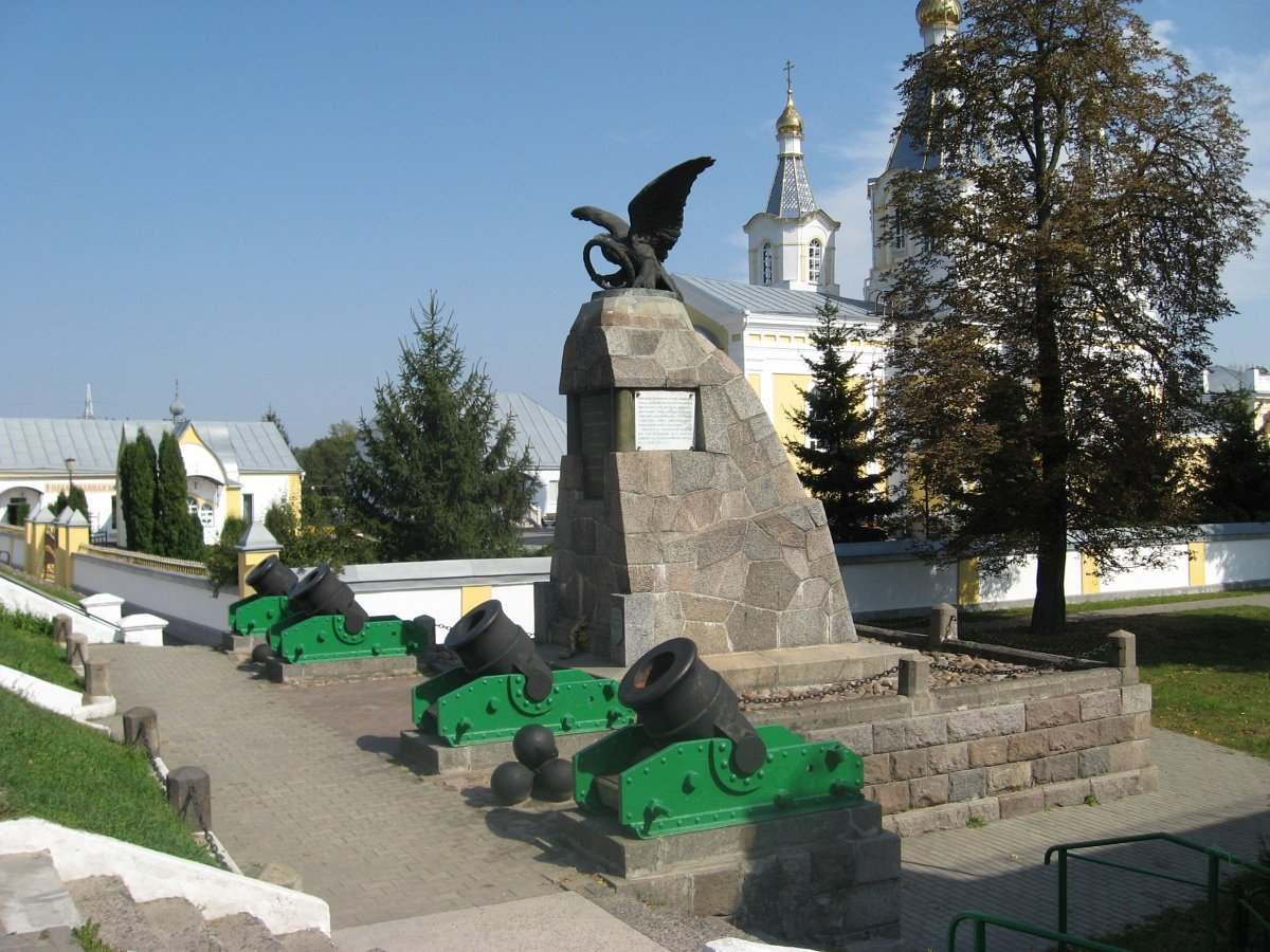 Кобрын. Помнік